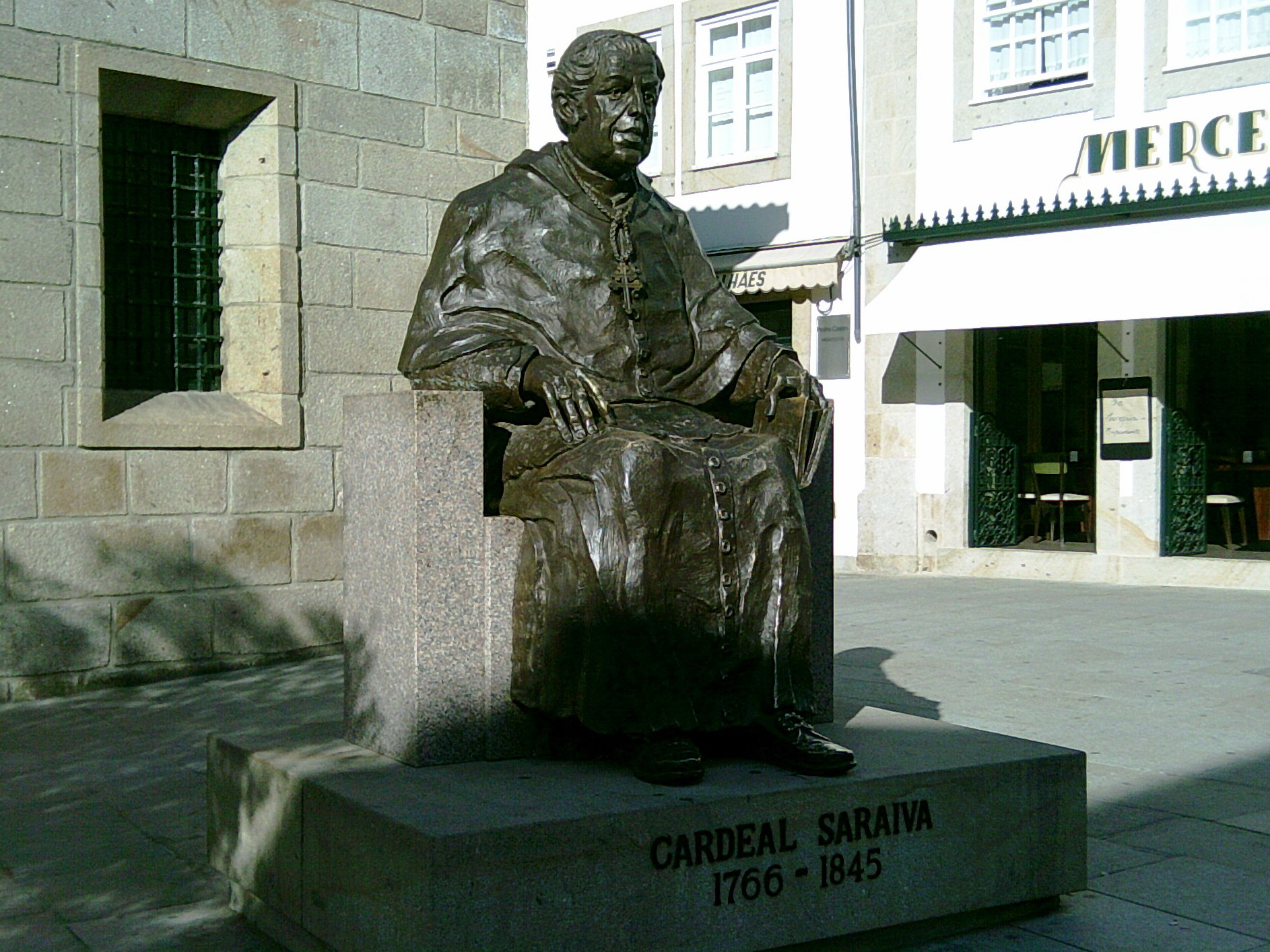 Estátua do Cardeal Saraiva (Francisco de São Luís Saraiva), Ponte de Lima, Distrito de Viana do Castelo, Portugal.